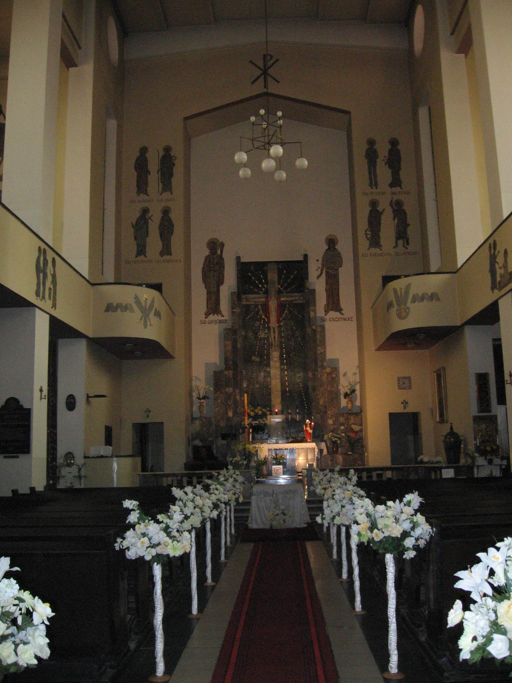 Kościół garnizonowy w Katowicach, wnętrze